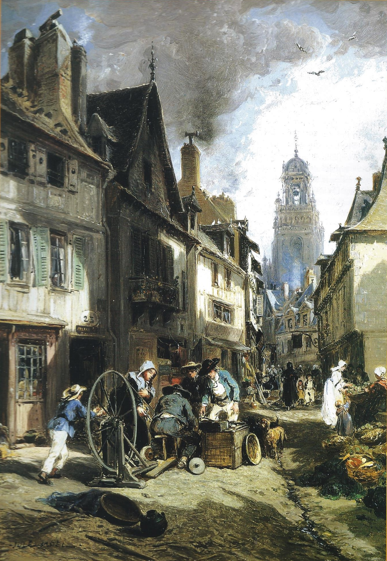 Jules Noël (1810-1881) : Le rémouleur à Morlaix (vers 1869, huile sur toile, Musée des Jacobins de Morlaix)